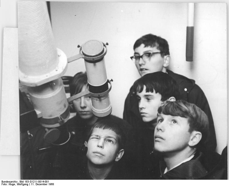 Eilenburg, Jugendstunde in der Sternwarte Zentralbild Kluge 11.12.1968 Leipzig: Jugendstunde in der Sternwarte Eine geheimnisvolle Welt entdecken diese Schüler der Tagesoberschule in Doberschütz beim Besuch der Volks- und Schulsternwarte "Juri Gagarin" in Eilenburg, Bezirk Leipzig. Die Jungen lernten die zweitgrößte Schulsternwarte der DDR während ihrer Jugendstunden kennen. Bis zu 200 Schüler kommen im Jahr zur Vorbereitung auf die Jugendweihe in diese Sternwarte. Außerdem besuchen Pioniergruppen, Schüler der 10. Klassen (zur Ergänzung des Astronomie-Unterrichts) und viele Erwachsene die Bildungsstätte. Seit 40 Jahren werden Sonnenbeobachtungen unternommen, seit 11 Jahren können Satelliten beobachtet werden. In der DDR existieren etwa 200 Schulsternwarten, von denen die größte in Rodewisch liegt.